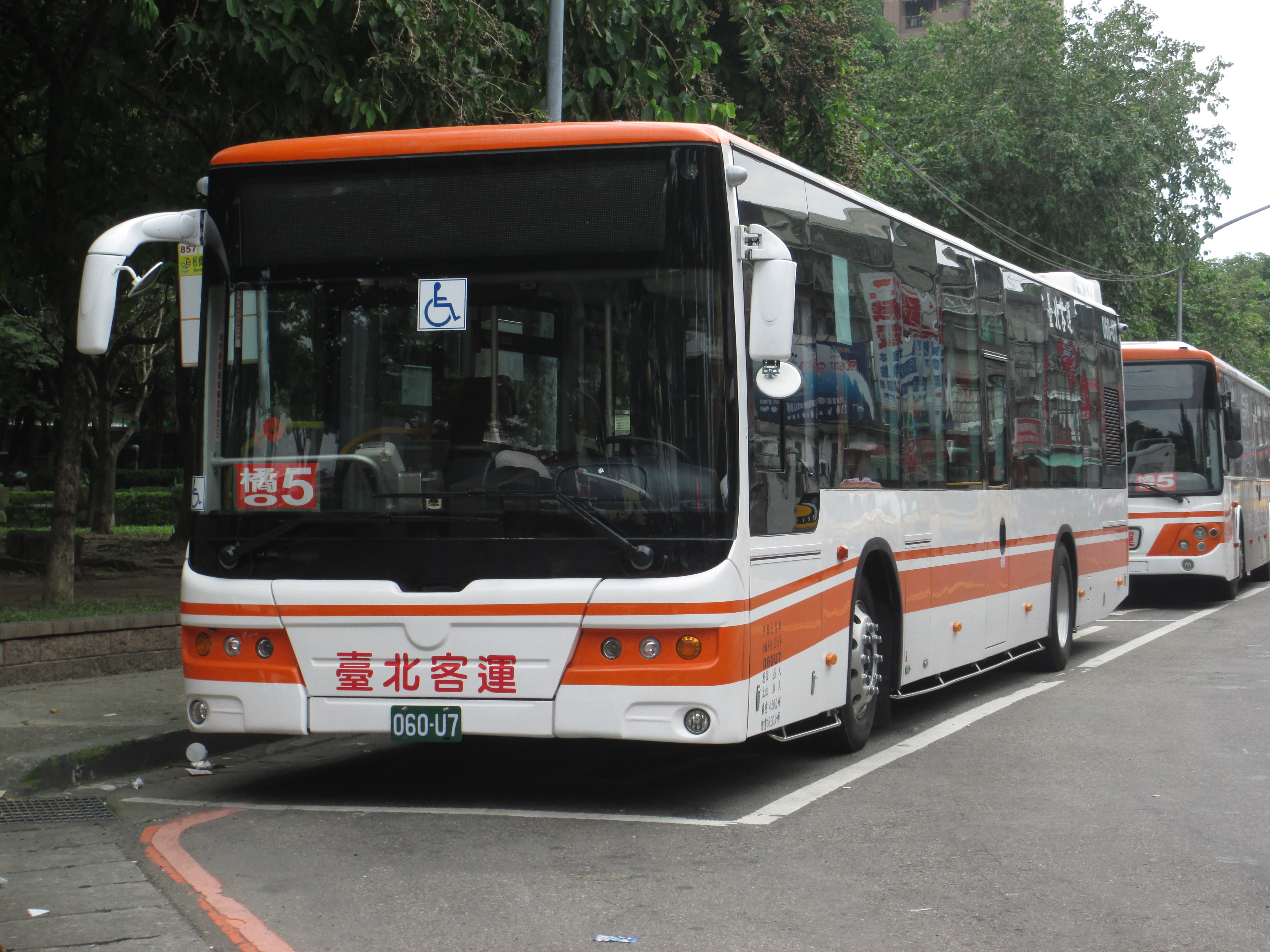 臺北客運金旅XML6125三門低地板公車060-U7